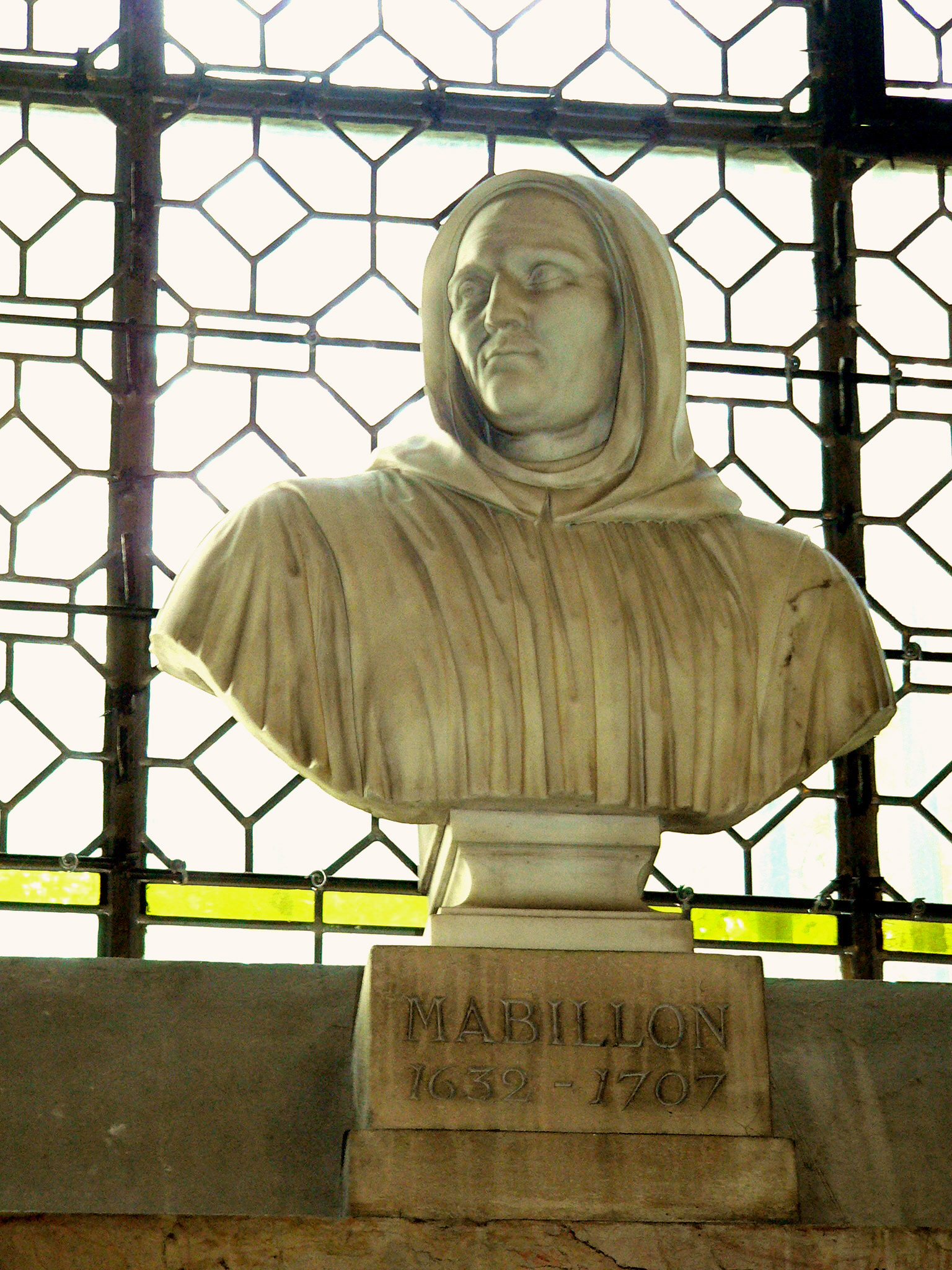 Buste de Mabillon, réplique de celui qui se trouve sur la façade occidentale de l'église